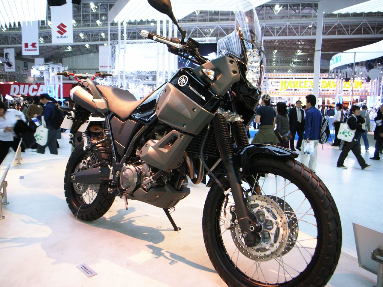 次買うならこんなバイクがいい。こいつならどこへでも行けるはず。BMWっぽいシックなカラーが◎。パニア付けたいね。